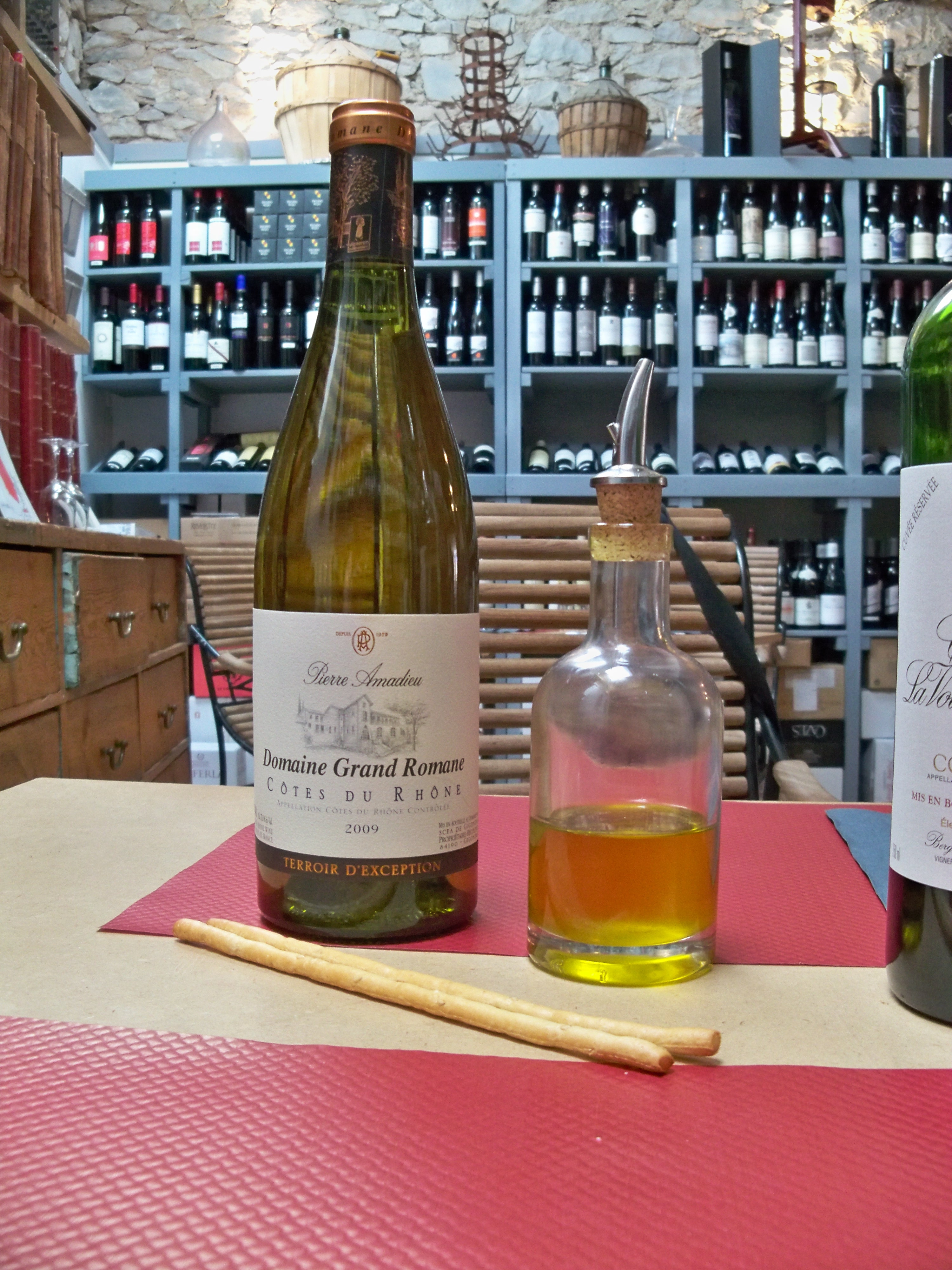 Bouteille de Grand Romane